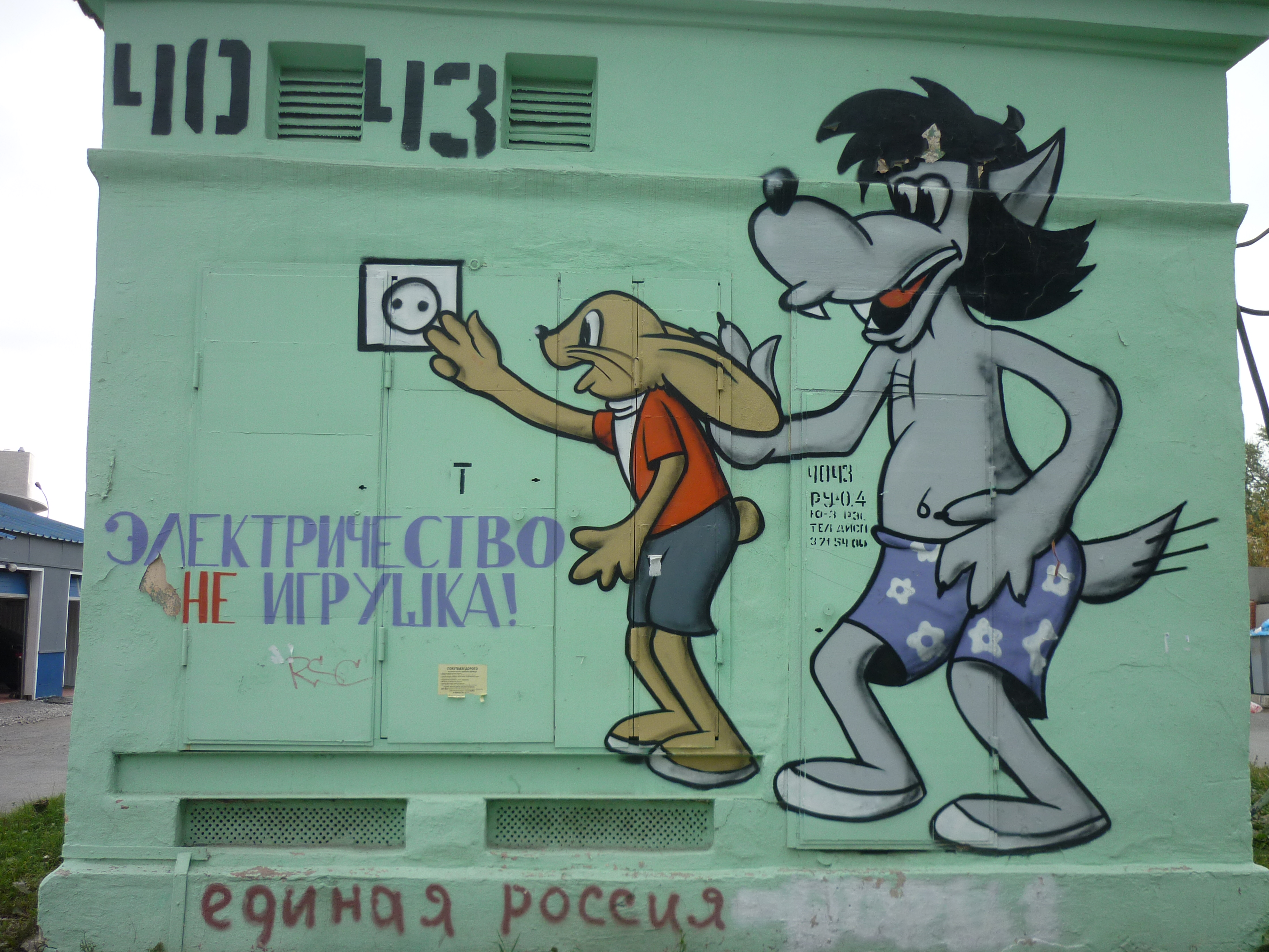 Трансформаторная будка 4043 Екбург